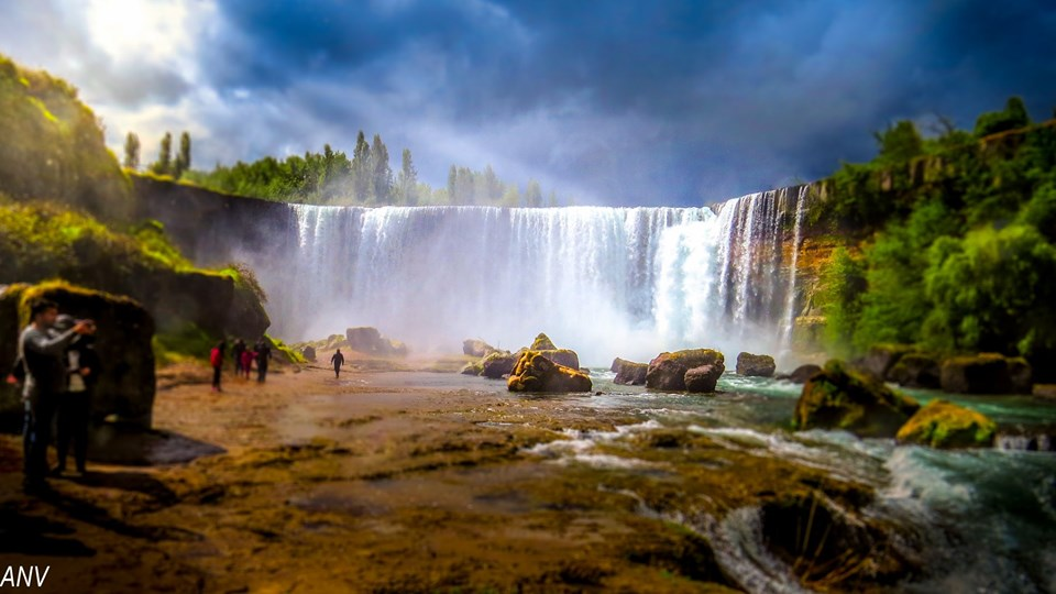 Salto del Laja un día de invierno